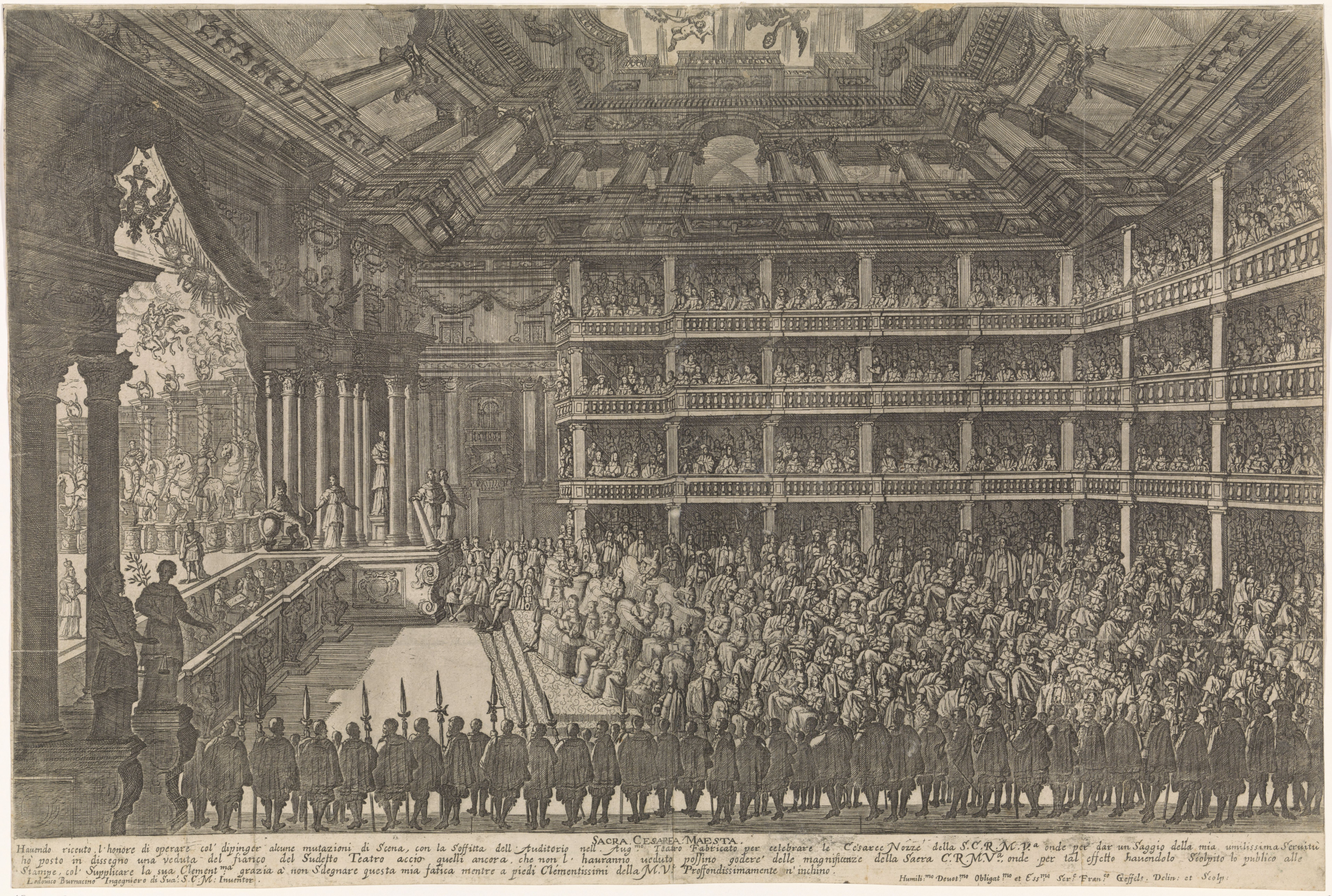 IdentificatieTitel(s): Operavoorstelling voor Keizer Leopold I, 1668Sacra cesarea Maesta (titel op object)Objecttype: prent Objectnummer: RP-P-OB-52.508Catalogusreferentie: Hollstein Dutch 9-2(2)Opmerking: 2(2) aan de hand van aanwezige staten RijksmuseumOpschriften / Merken: opschrift, verso midden onder, geschreven: ‘Inners des Operazaale bei den Vermalung des Kaizer Leopold I’verzamelaarsmerk, verso midden, gestempeld: Lugt 2166Omschrijving: In het concertgebouw van Wenen wordt de opera 'Il Pomo d'Oro' opgevoerd voor het hof van Leopold I in Wenen ter ere van de verjaardag van de keizerin Margaretha Theresia van Spanje (1668). De keizerlijke familie zit vooraan. Op de voorgrond een rij soldaten. De prent heeft een Italiaans onderschrift.VervaardigingVervaardiger: prentmaker: Frans Geffels (vermeld op object)naar tekening van: Frans Geffels (vermeld op object)naar ontwerp van: Lodovico Ottavio Burnacini (vermeld op object)Plaats vervaardiging: MantuaDatering: 1668 - ca. 1670Fysieke kenmerken: etsMateriaal: papier Techniek: etsenAfmetingen: blad: h 337 mm × b 503 mmOnderwerpWat: operaopera houseWie: Leopold I (keizer van Duitsland)Margaretha Theresia (keizerin van Duitsland)Verwerving en rechtenVerwerving: onbekendCopyright: Publiek domein